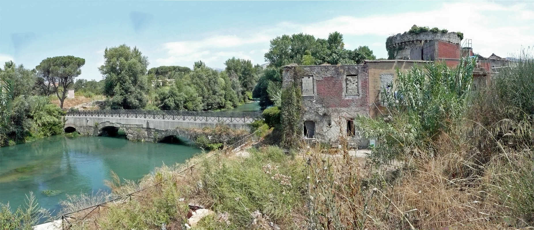 Pont Lucano, sur l'Anio. Mausolée des Plautii et vestiges de l'auberge Renaissance.